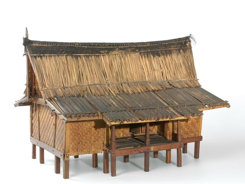 Huismodel. Huis van het hoofd van de kampong, behorende bij meerdere gebouwen die samen een Sundanese kampong voorstellen. Dit gebouw staat wat hoger dan de overige.. Onderdeel Sundanese kampong, model van het huis van het kamponghoofd.